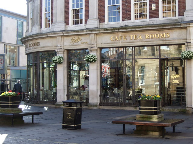 Bettys, Est. 1919